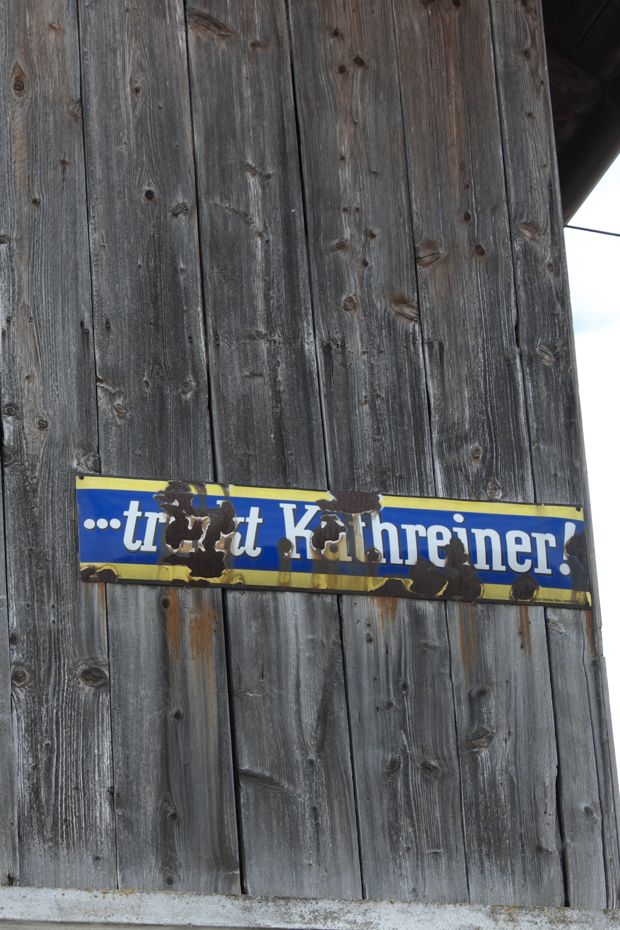 Emaille-Reklmeschild in Traubing, einem Ortsteil von Tutzing im Landkreis Starnberg (Bayern/Deutschland), Trinkt Kathreiner